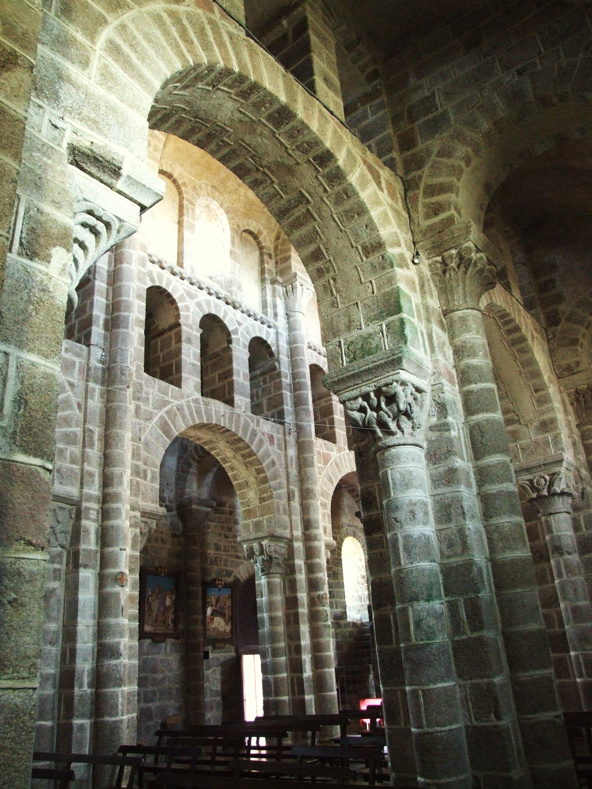 Châtel-Montagne - Eglise Notre-Dame - Elévation de la nef